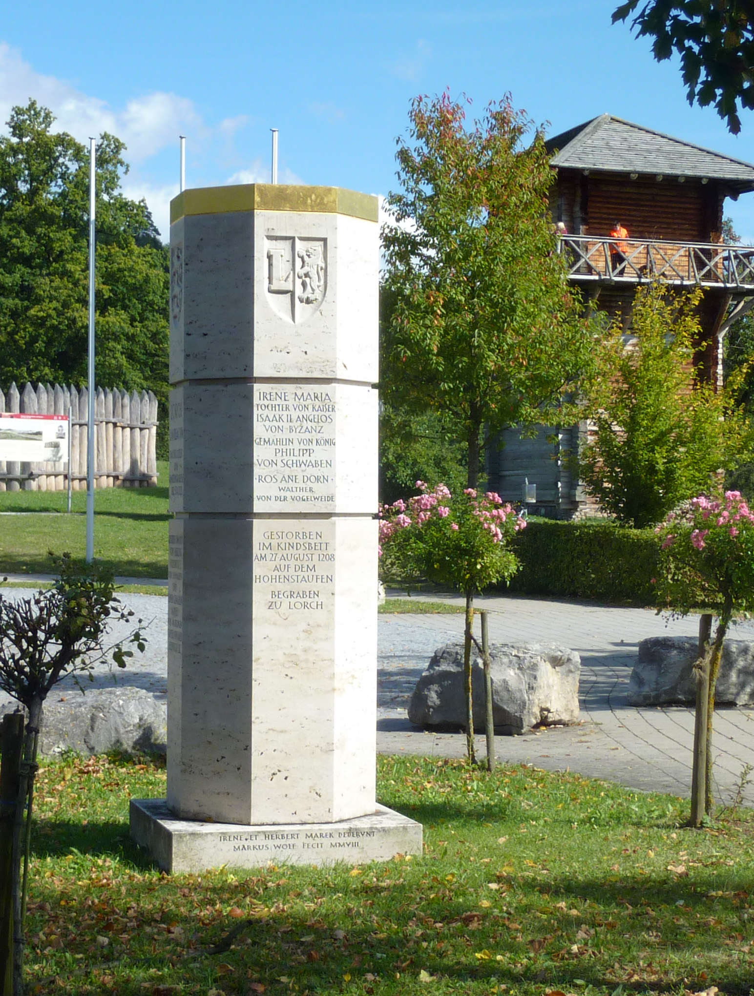 Stauferstele in Lorch mit Inschrift, die an die dort im Kloster begrabene Irene von Byzanz erinnert.